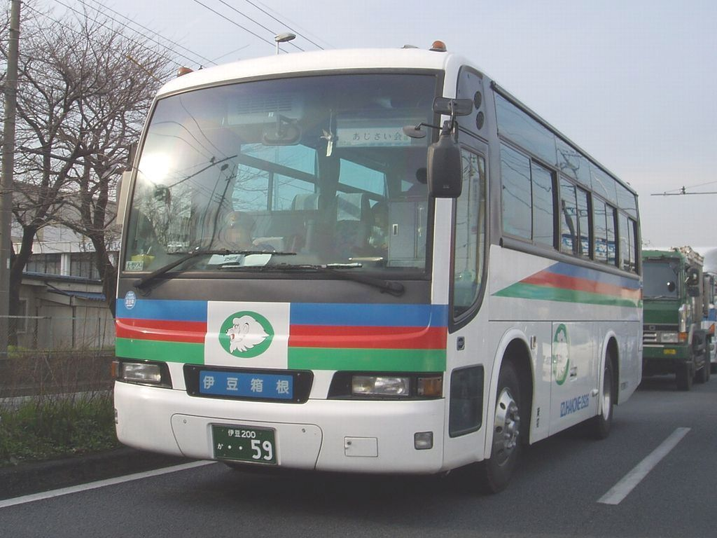 Izuhakone Bus 2926 Nissan Diesel KC-RP250FBN at Route129 in Japan